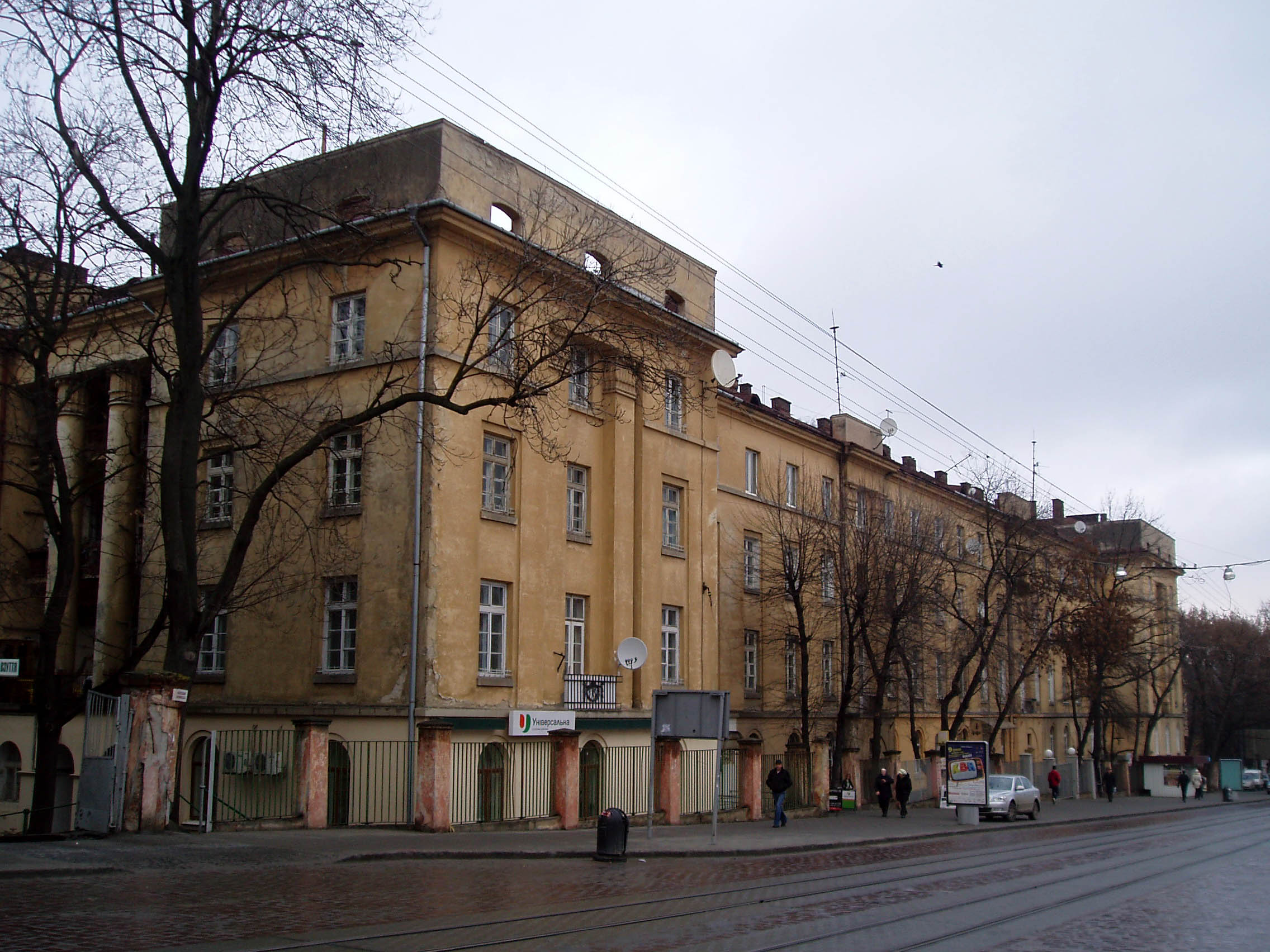 Дім № 42 на вулиці Городоцькій у Львові. Збудований 1930 за проектом Рудольфа Індруха (1882—1927).